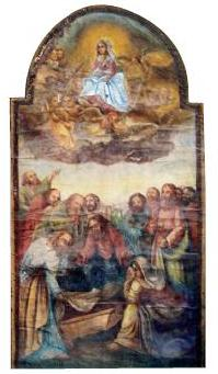 15.3 KB Icoana veche pictată pe fațada dinspre cimitir